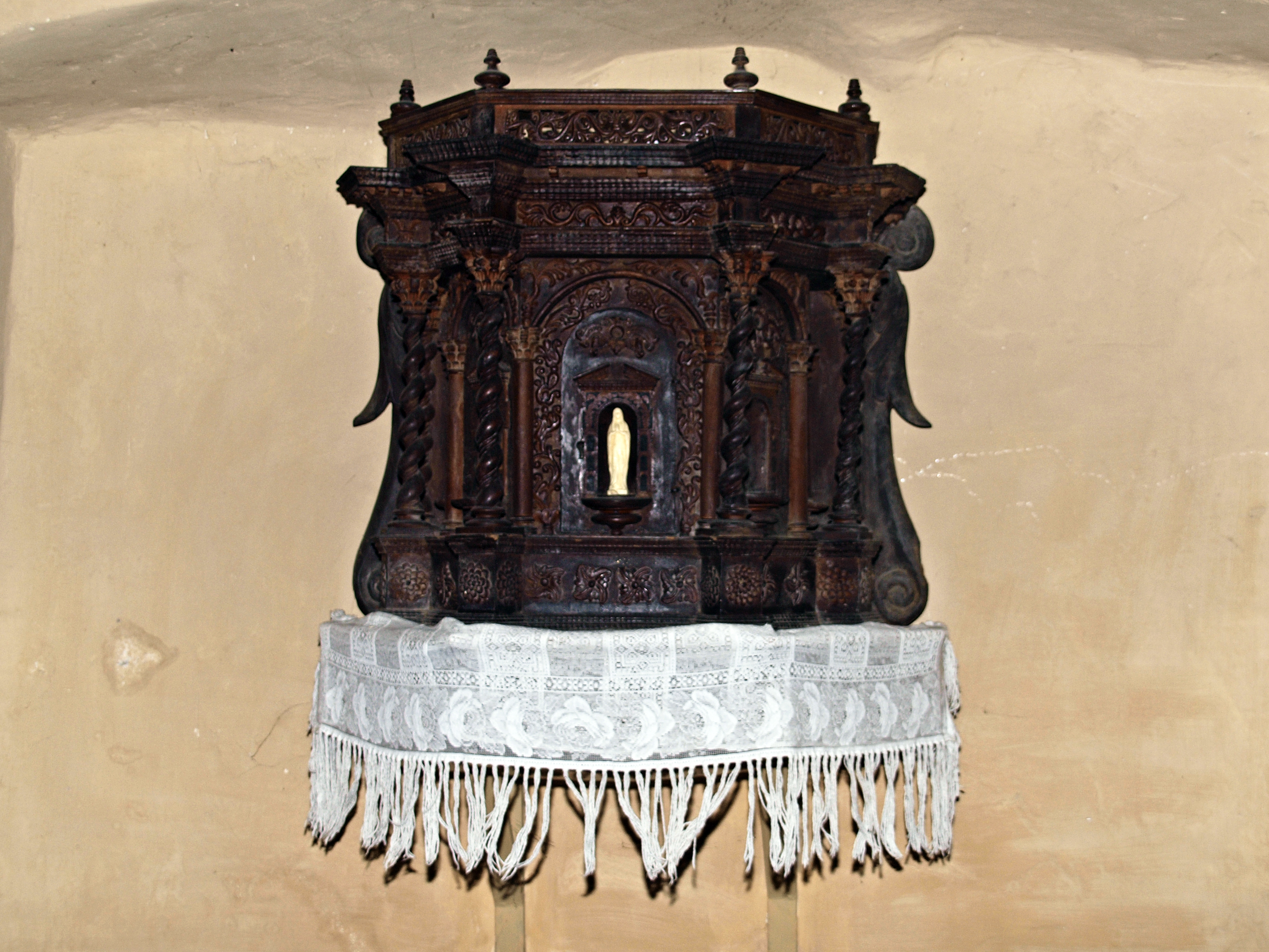 Mausoléo (Corsica) - Tabernacle dans l'église San Salvadore